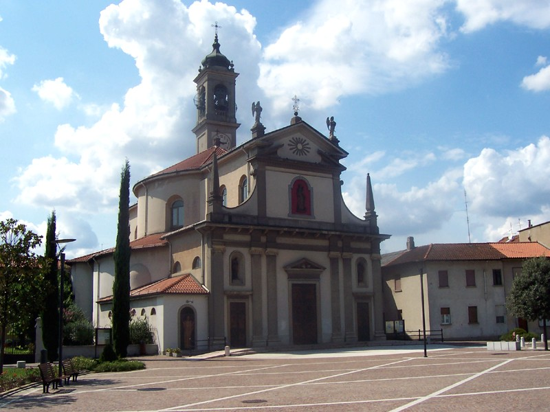 Caponago - Chiesa Parrocchiale di S. Giuliana